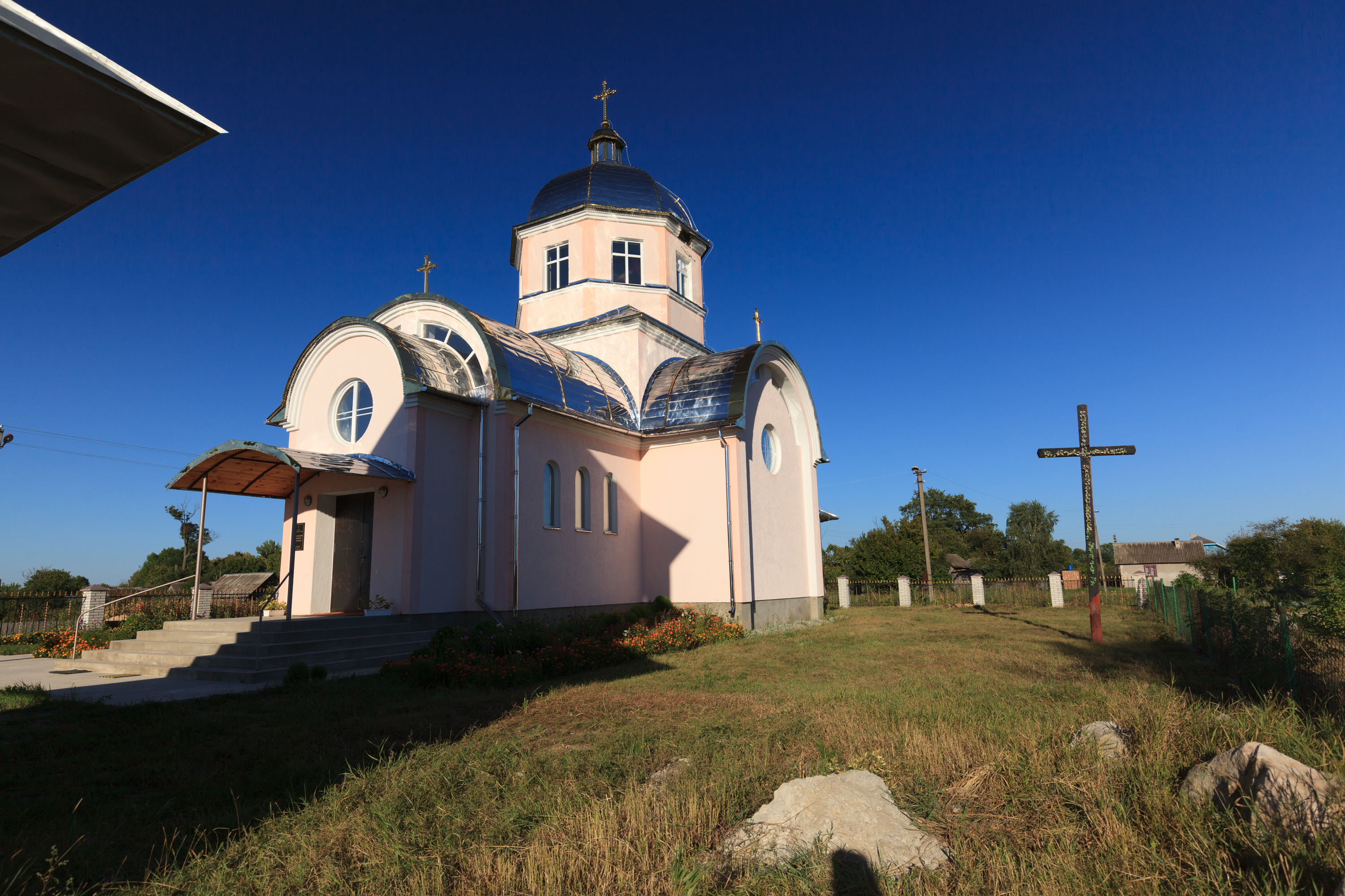 Церква Введення в храм Пресвятої Богородиці (дер.; згоріла), Переволочна